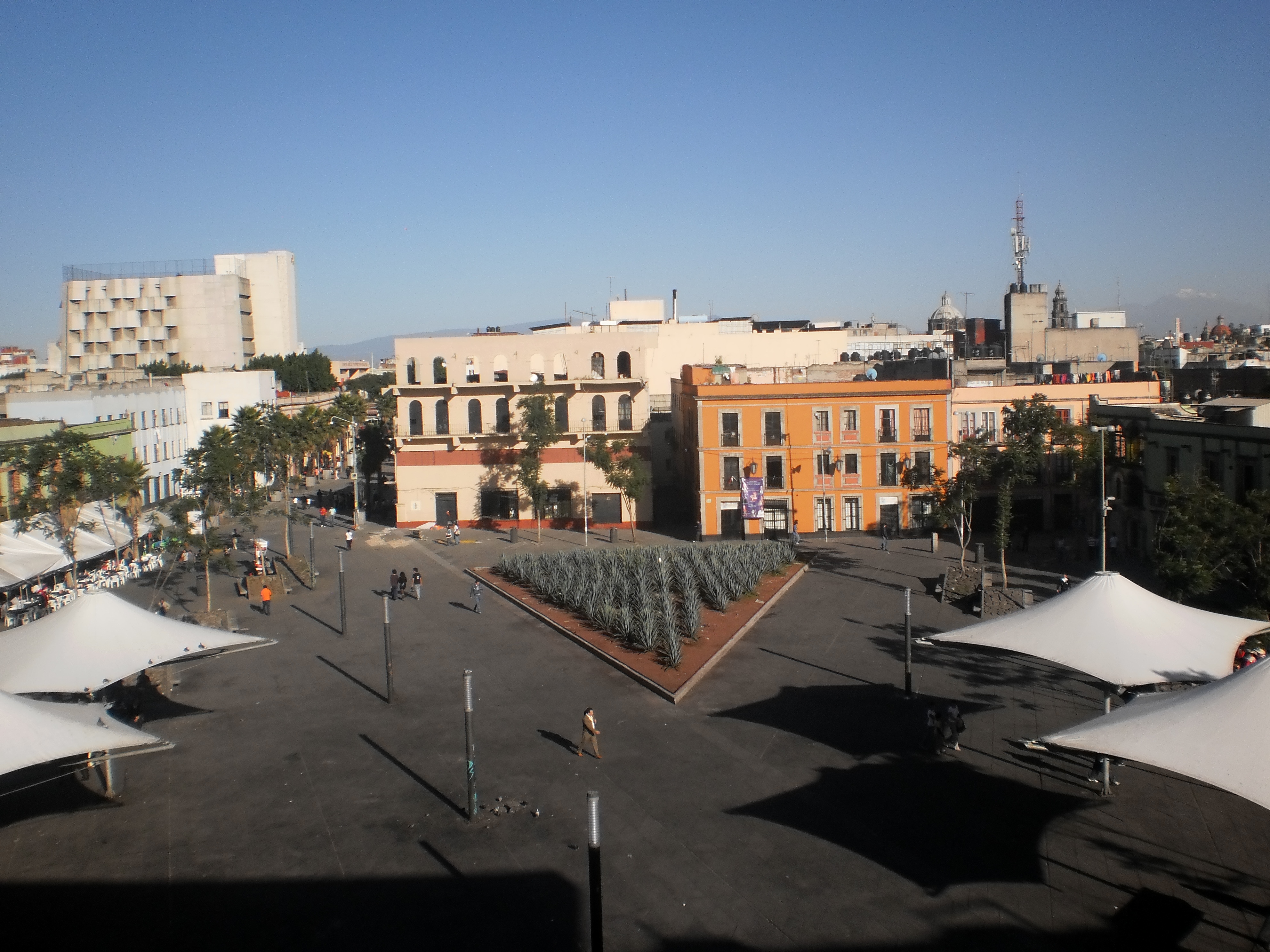 Vista desde el MUTEM